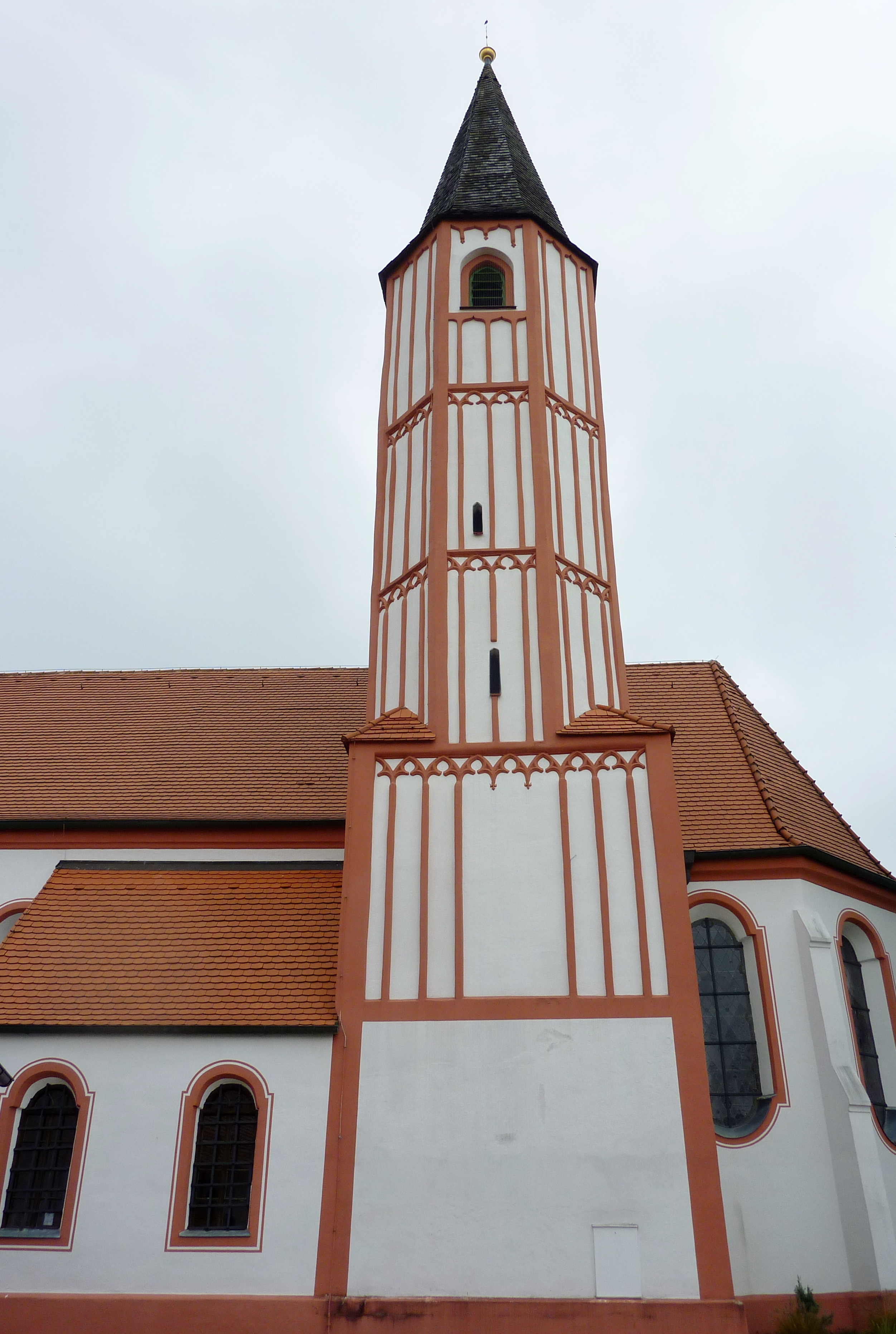 Katholische Wallfahrtskirche Heilig Blut in Einsbach, einem Ortsteil von Sulzemoos im Landkreis Dachau (Bayern/Deutschland), Turm mit Stab- und Maßwerkgliederung